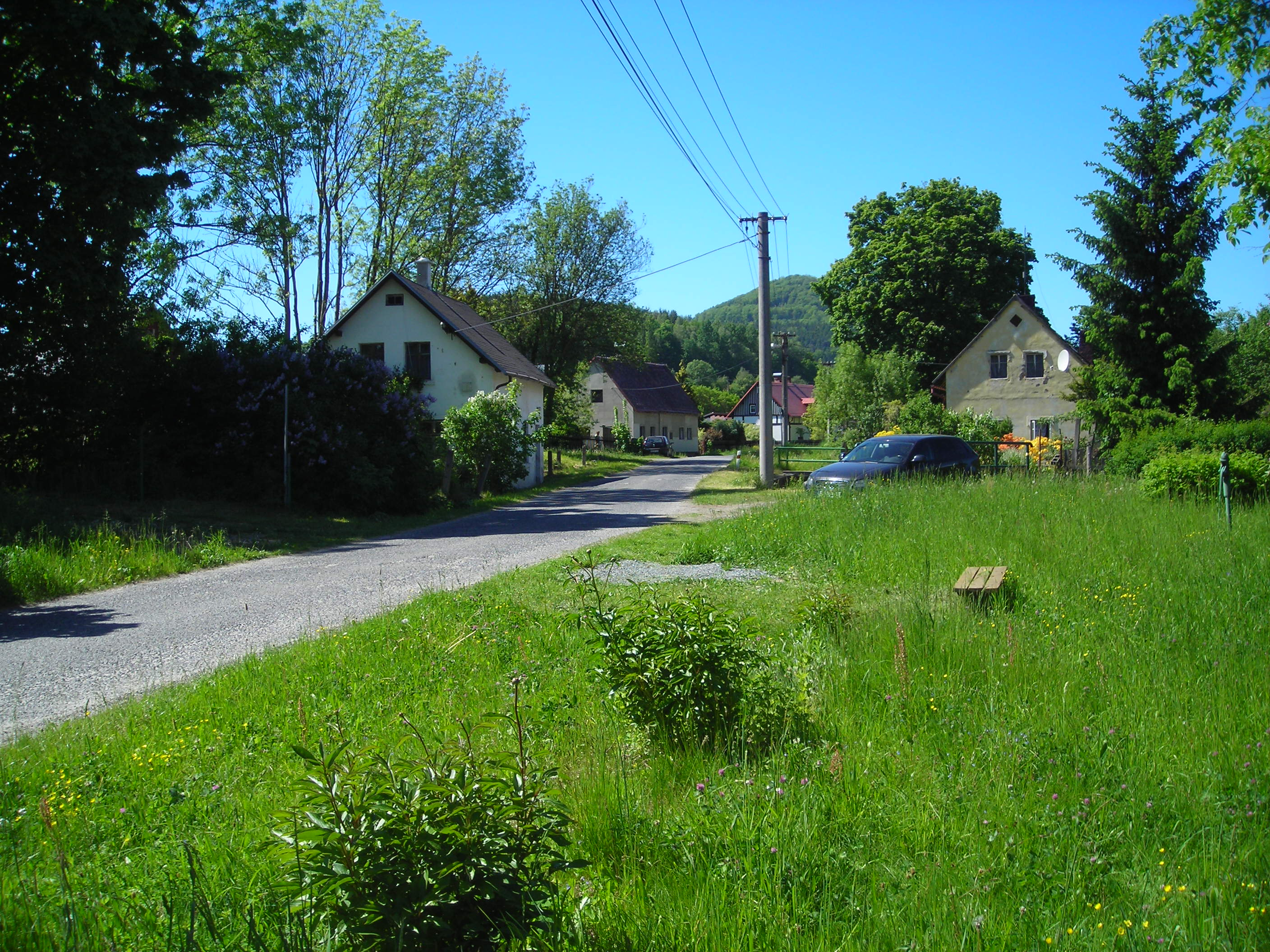 Silnice procházející vesnicí, částí města Jablonné v Podještědí, okres Liberec.